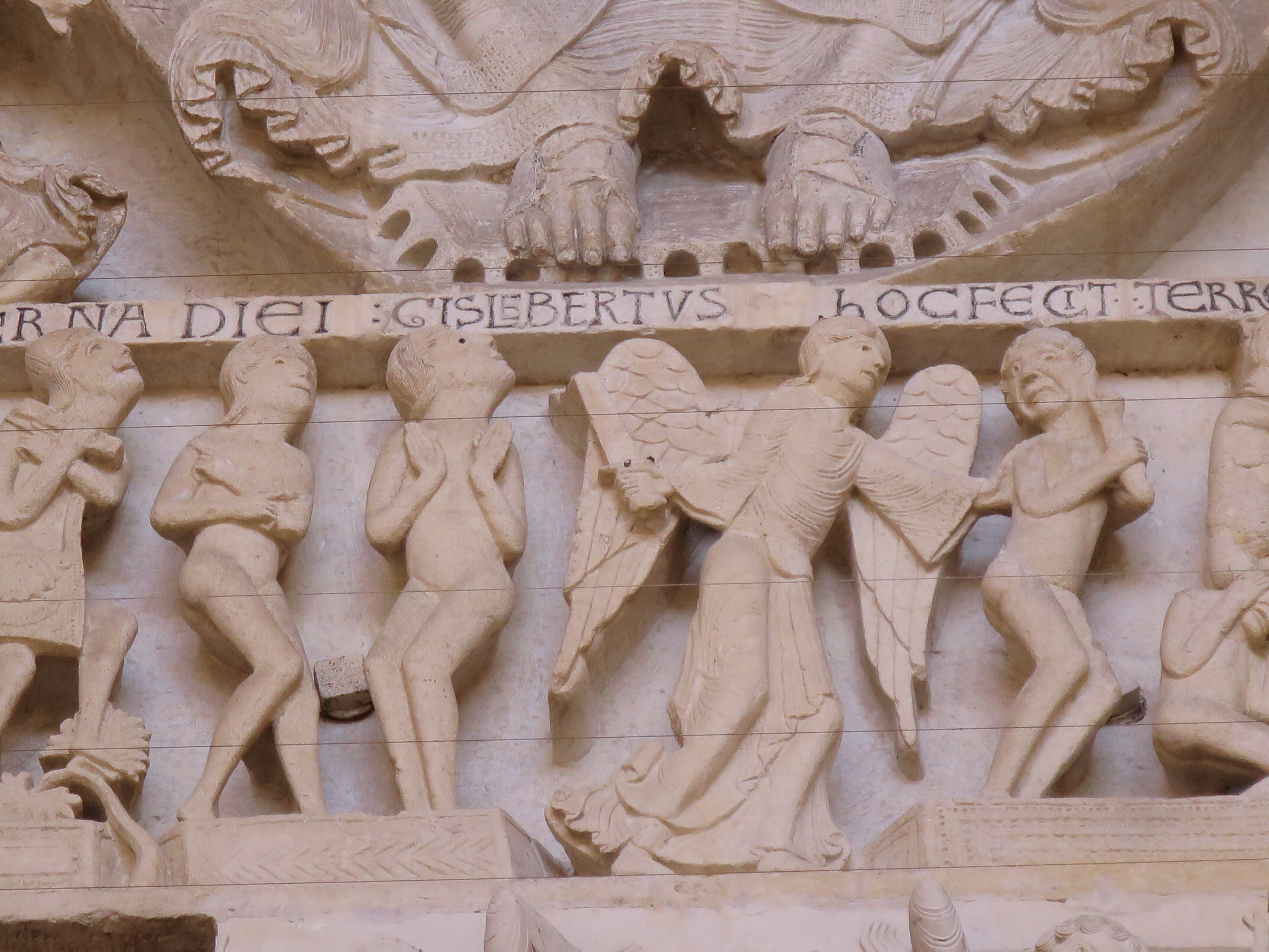 Gislebertus-Inschrift im Tympanon der Kathedrale von Autun